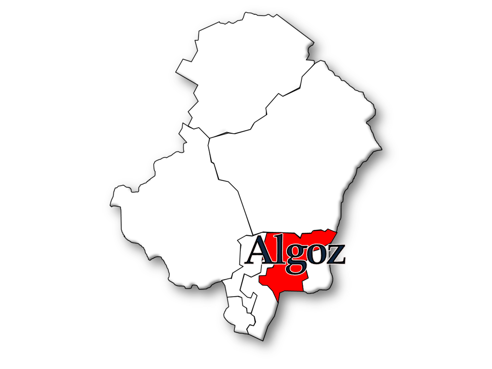 Censos 1864/2011